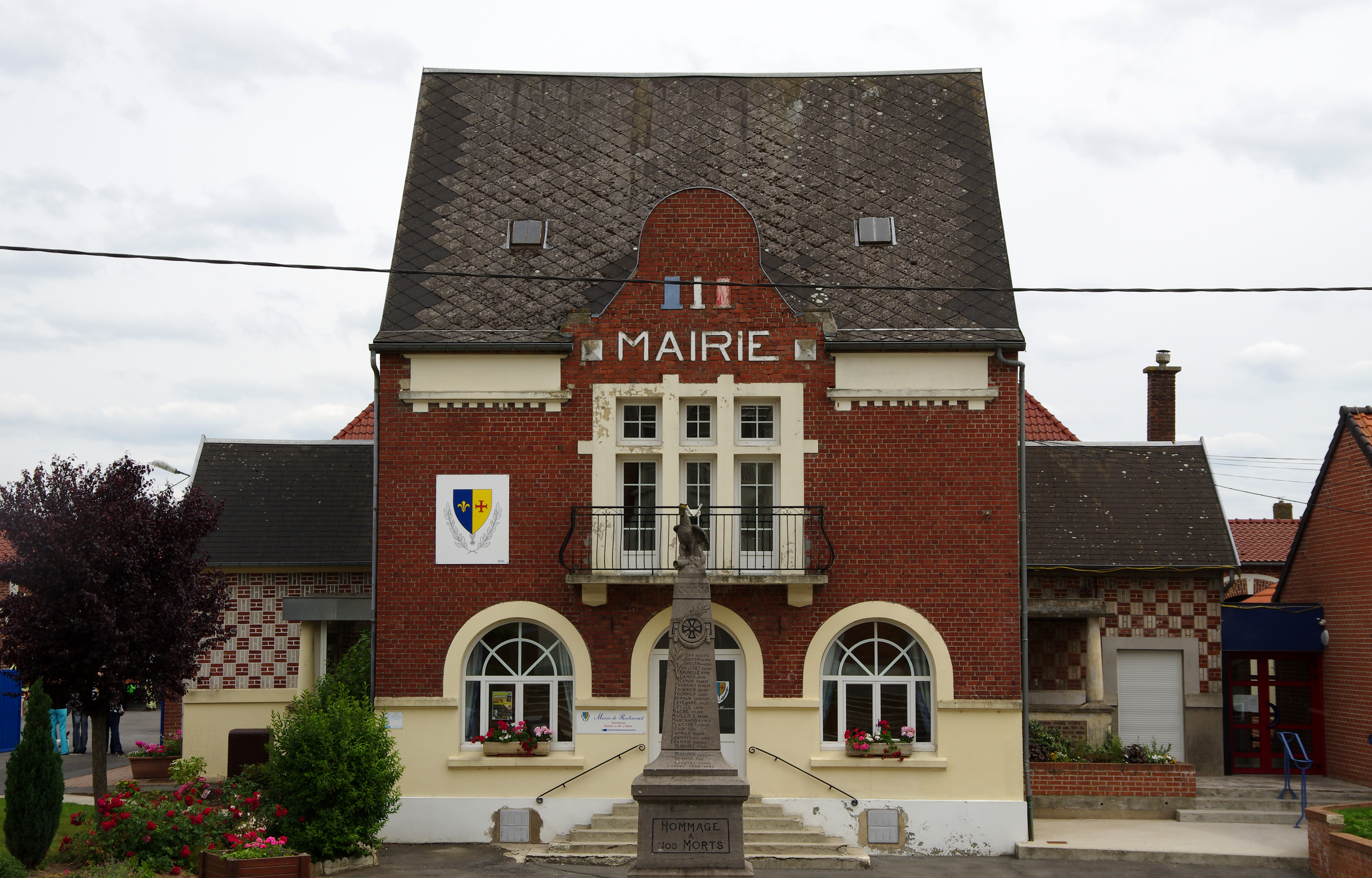 Roclincourt (Pas-de-Calais, France) - La mairie et le monument-aux-morts, vus depuis les marches montant à l'église, de l'autre côté de la rue. .